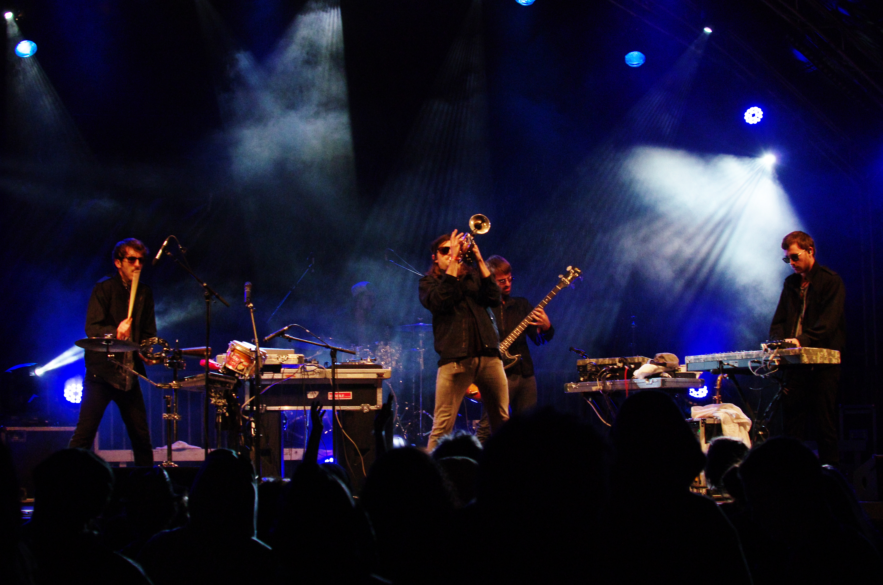 Misteur Valaire beim Traumzeit Festival 2013